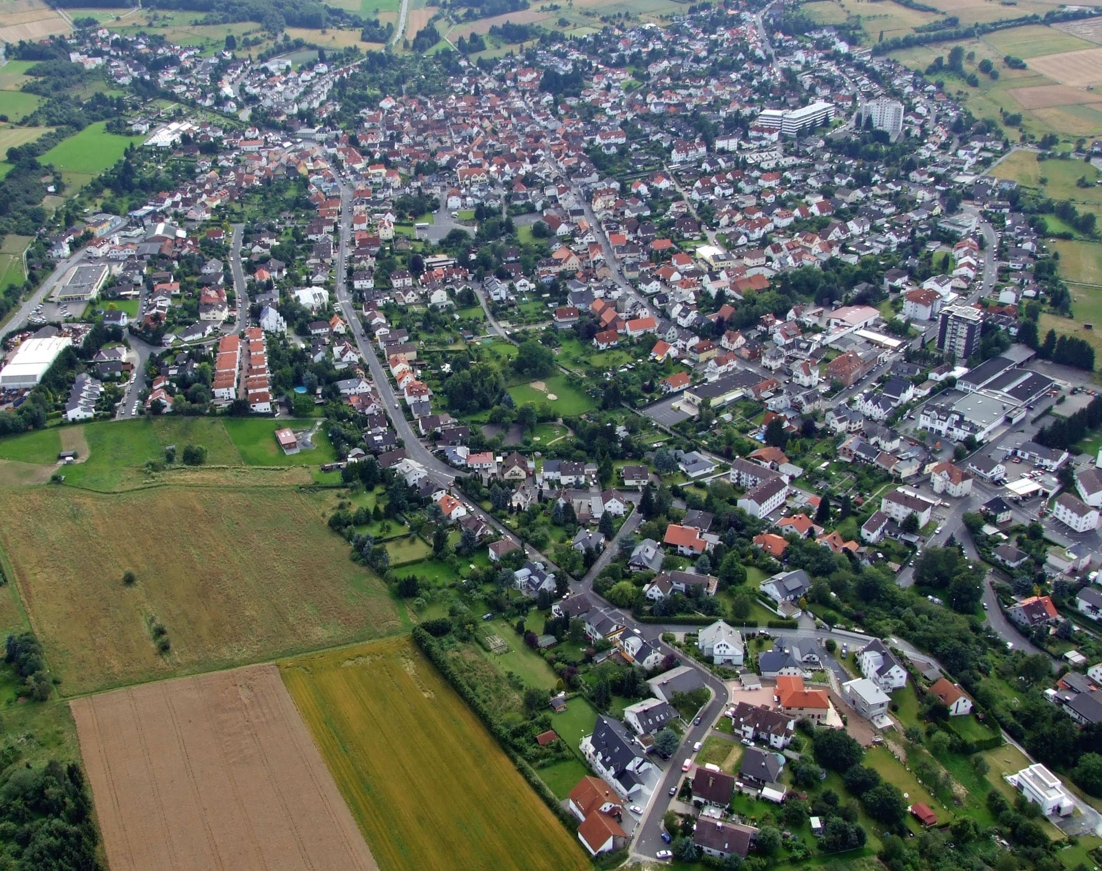 Neu Anspach aus der Luft